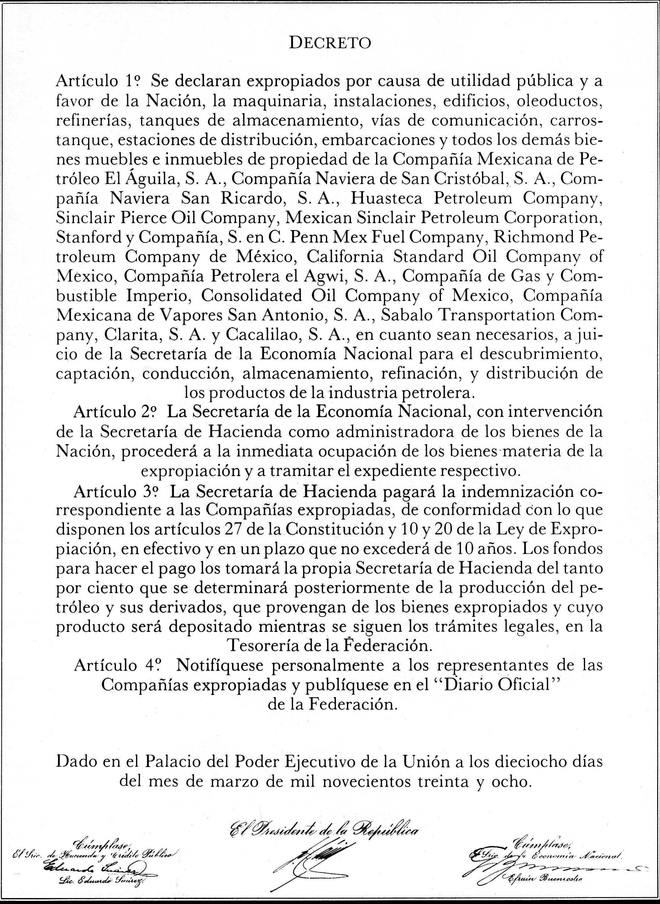 Copia publica del decreto de Expropiación Petrolera